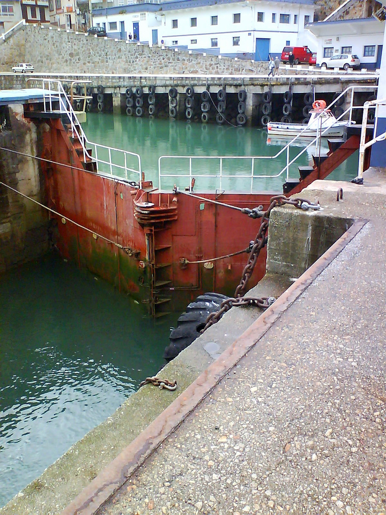 porto de Malpica de Bergantiños, A Coruña, Galicia'565577527_fcc1245c68_b.jpg'